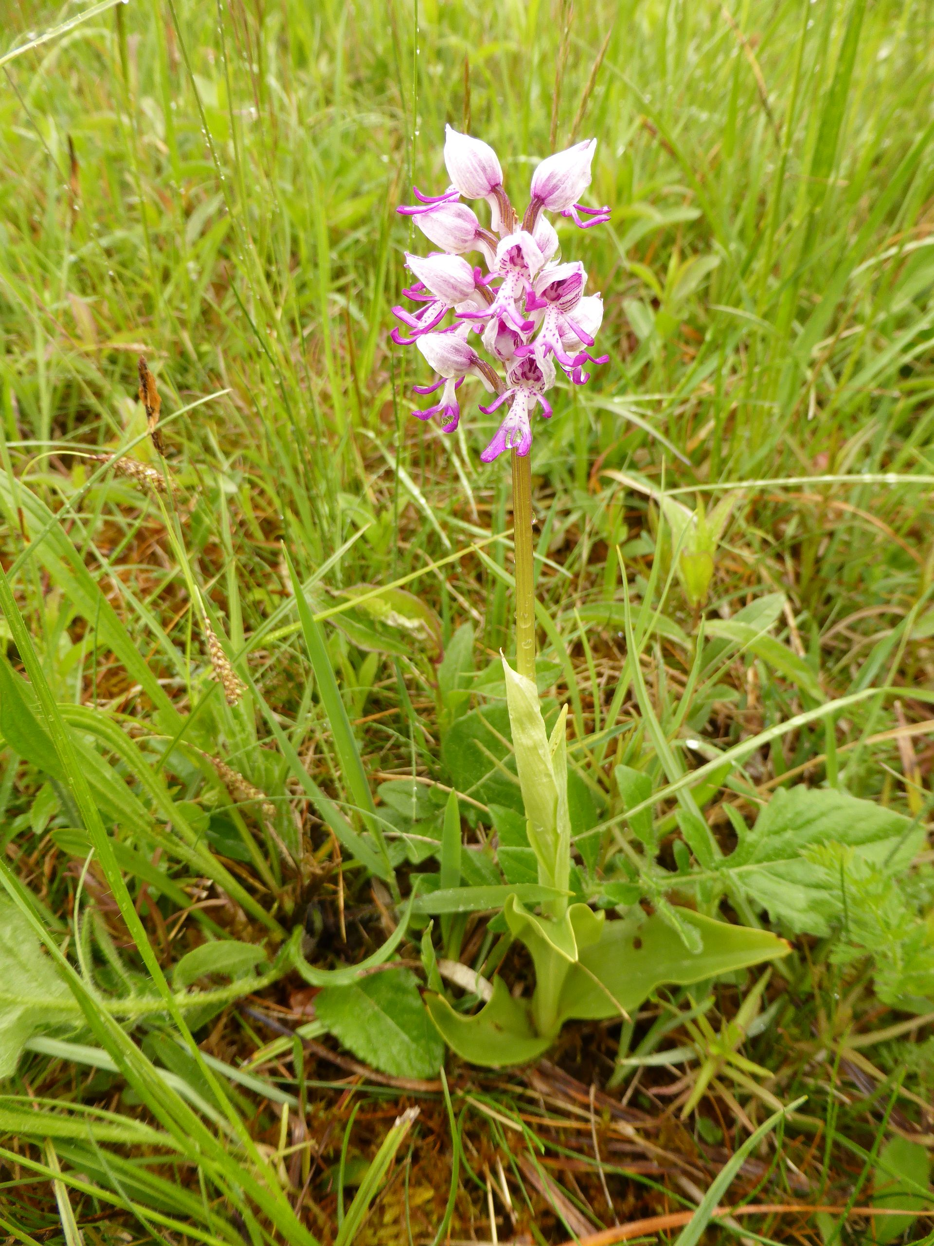 Affen-Knabenkraut (Orchis simia), Ersingen, Ersinger Springenhalde, 01.05.2015